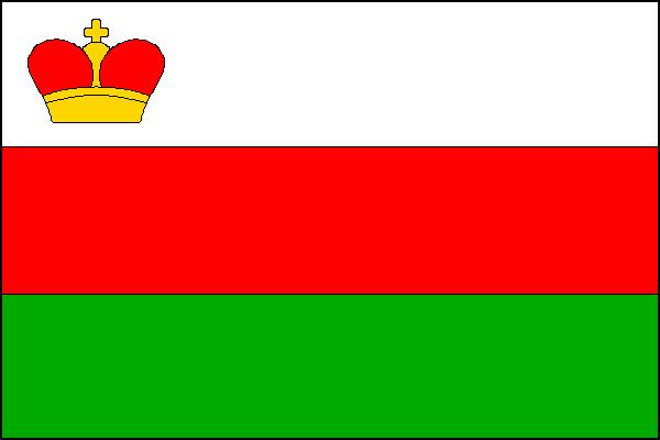 Vlajka obce Stonařov